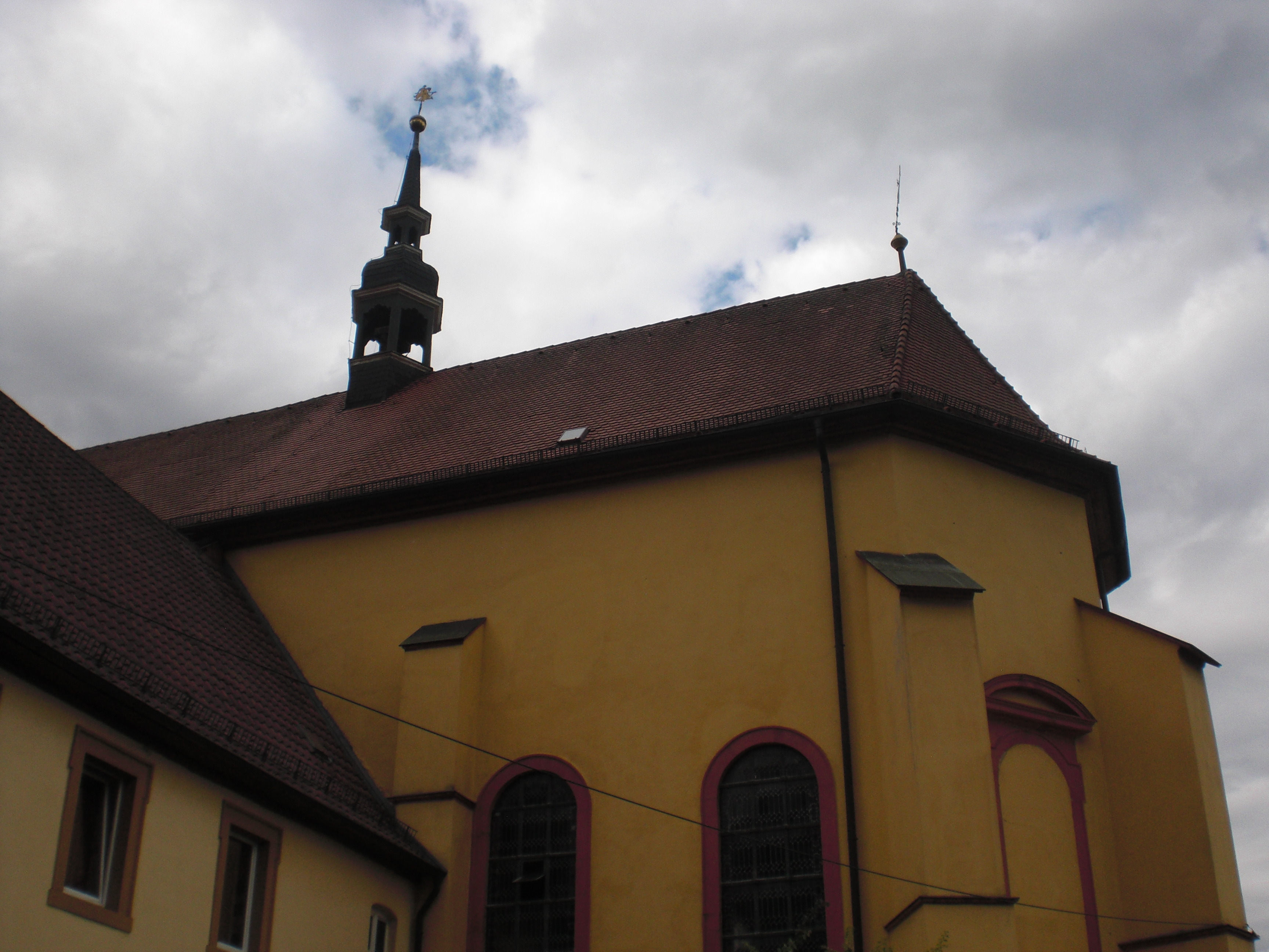 Kloster Altstadt